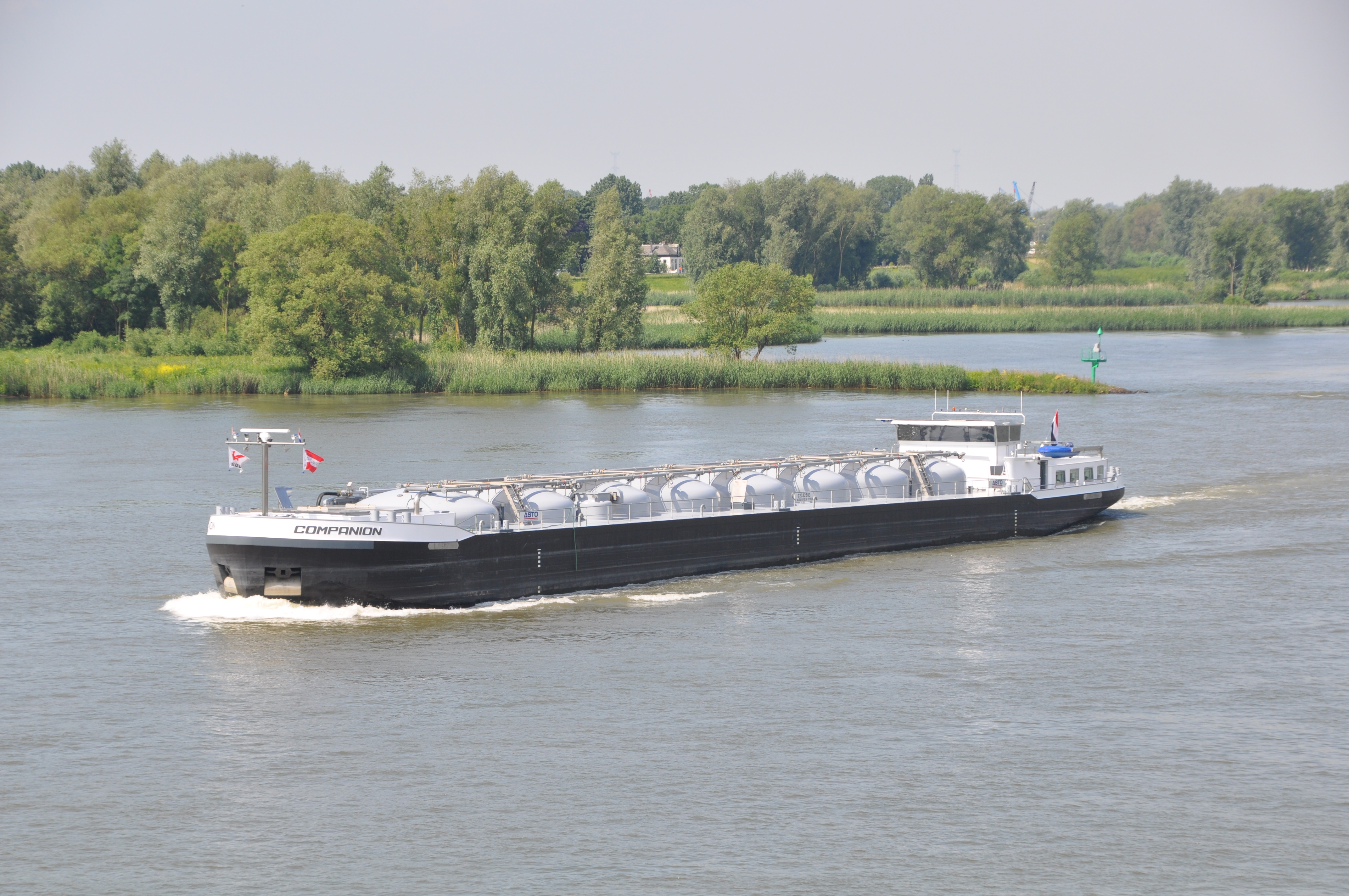 De COMPANION opvarend onder de Merwedebrug.